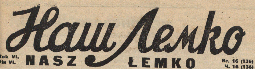 Winieta gazety etnicznej Nasz Łemko 1933